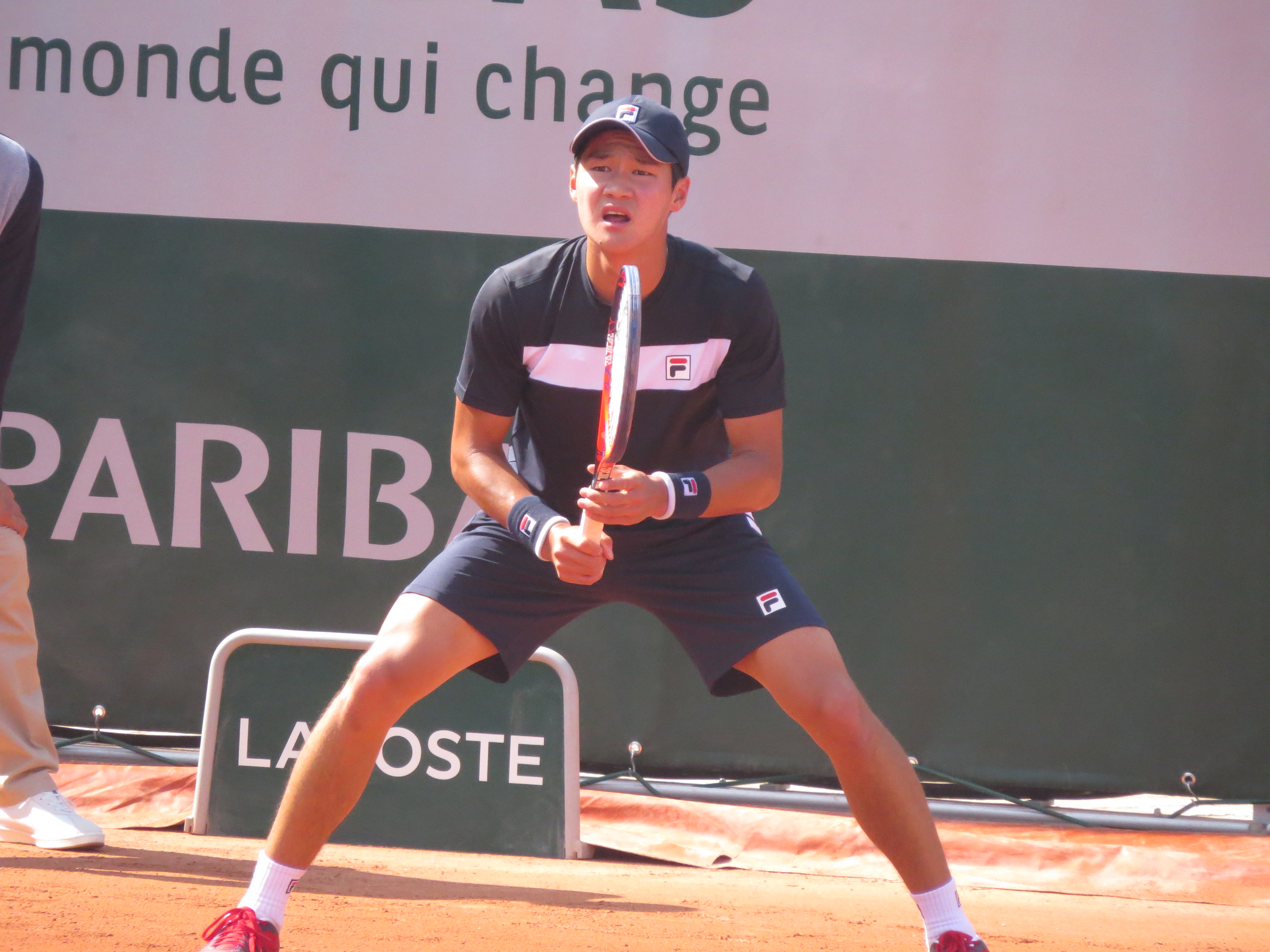 Soonwoo Kwon lors de son premier tour des qualifications.